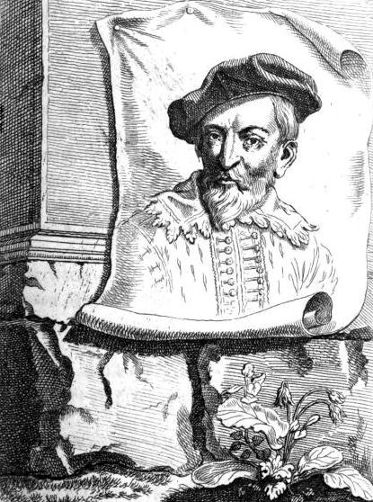 Portrait des Schweizer Kupferstechers Jost Amman.